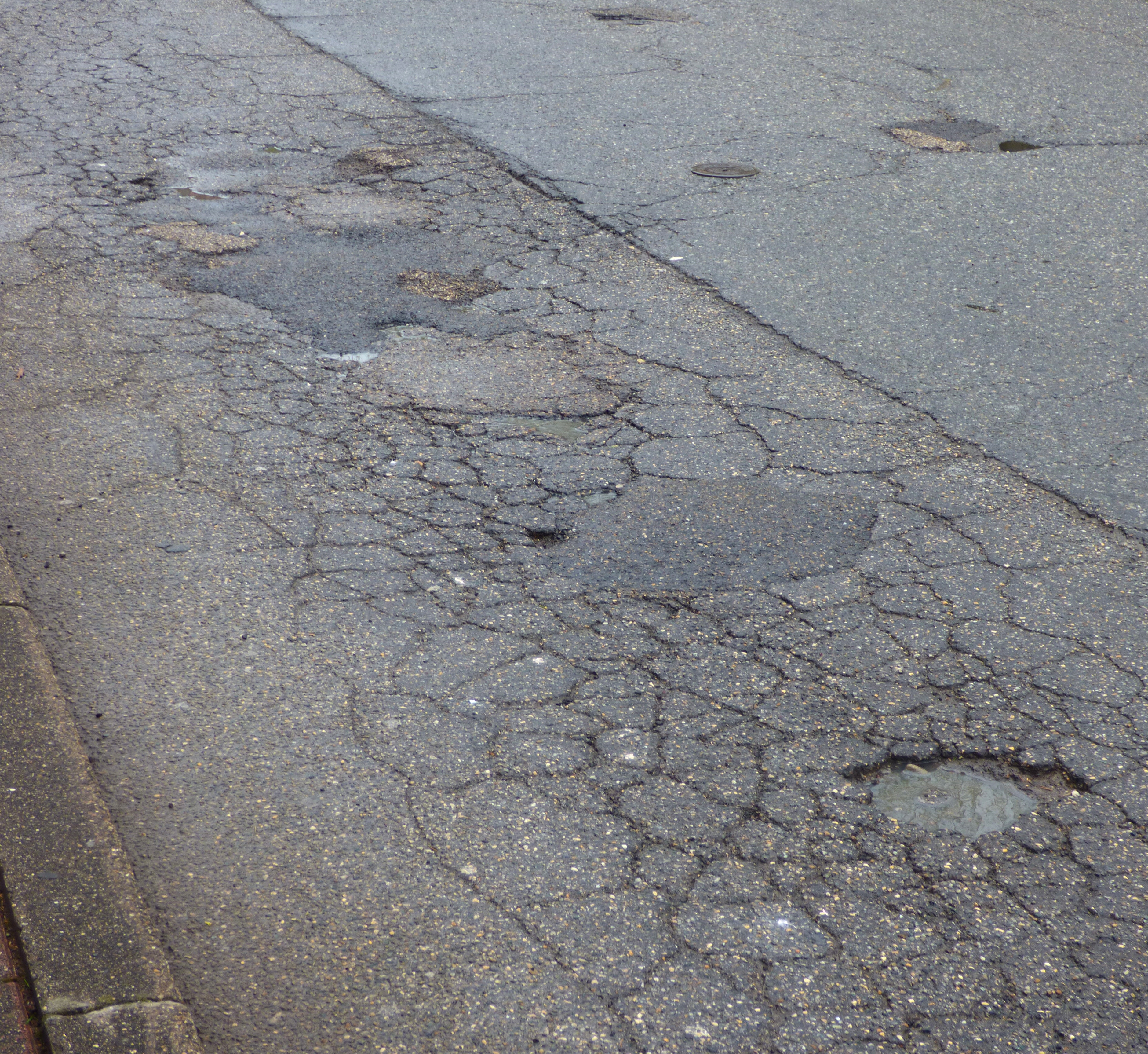 Des nids-de-poule partiellement rebouchés à l'aide d'enrobé à froid sur une route communale.